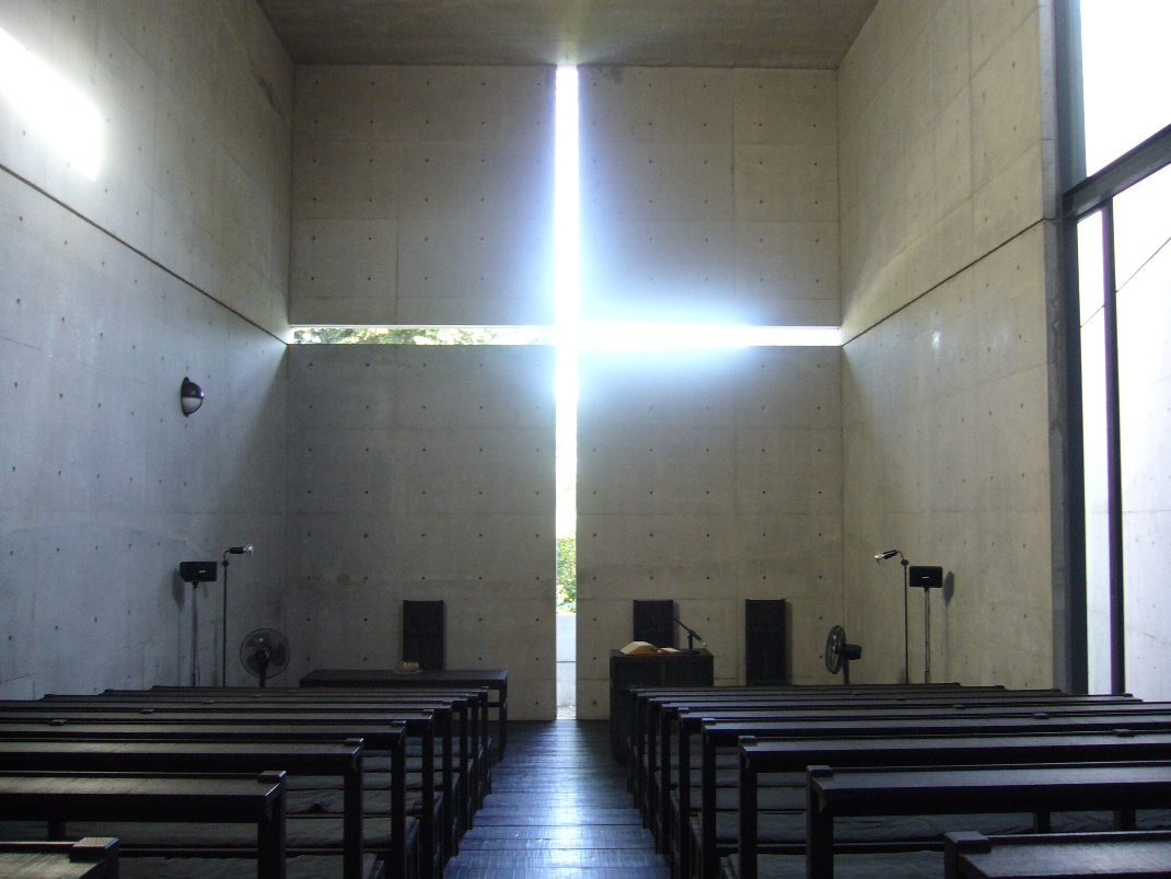 茨木春日丘教会の教会堂である「光の教会」のシンボル、光の十字架。2006年10月9日に投稿者が撮影。